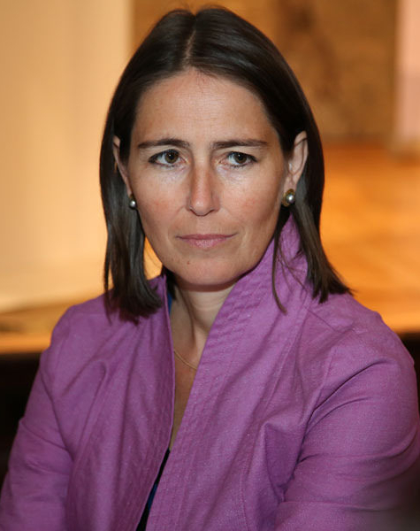 Alexandra Foederl-Schmid beim JournalistInnenkongrss 2014 im Haus der Industrie